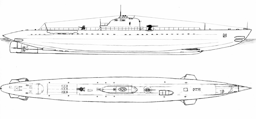 Французская субмарина типа "Минерва", схема